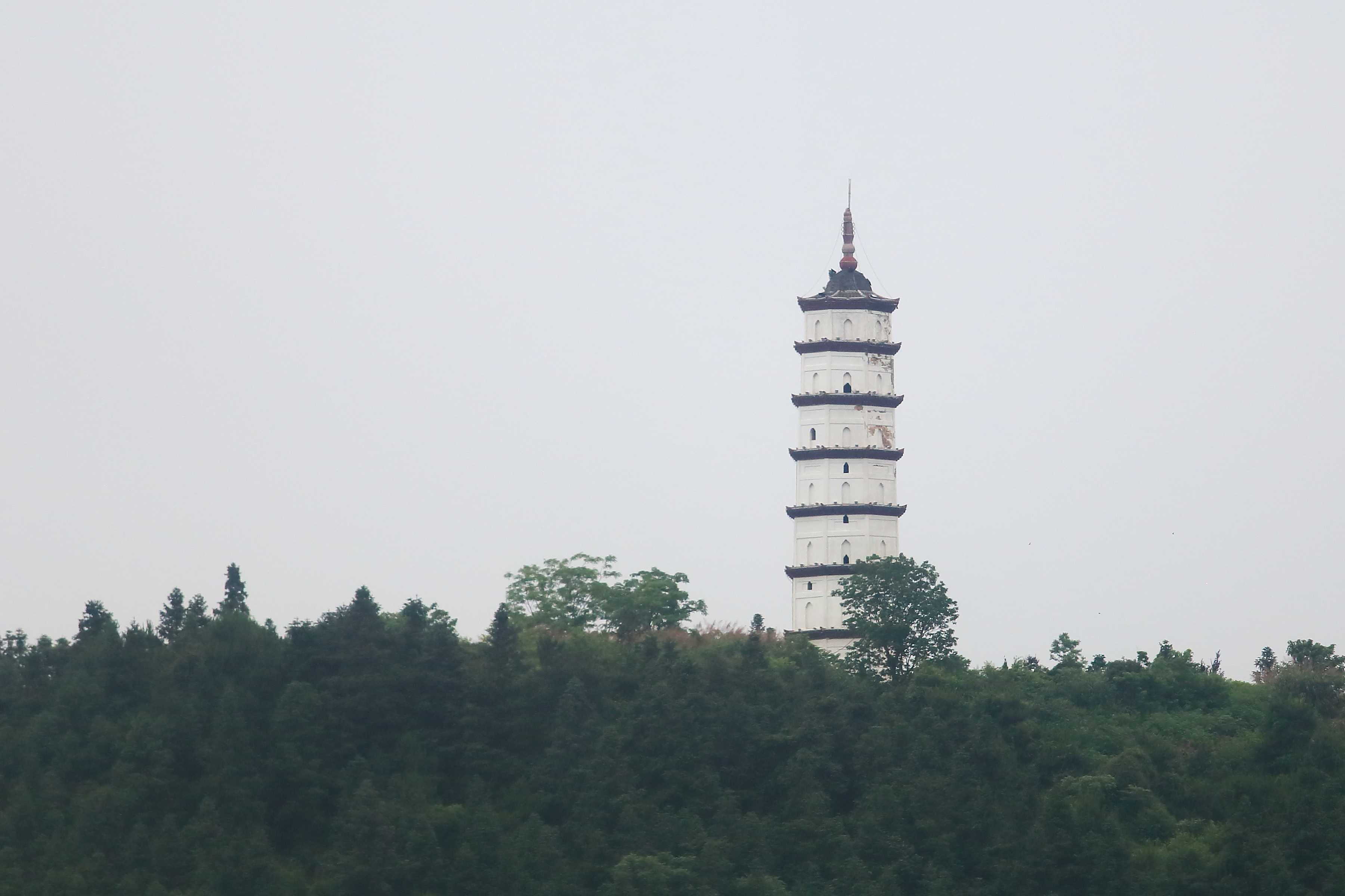 南城聚星塔